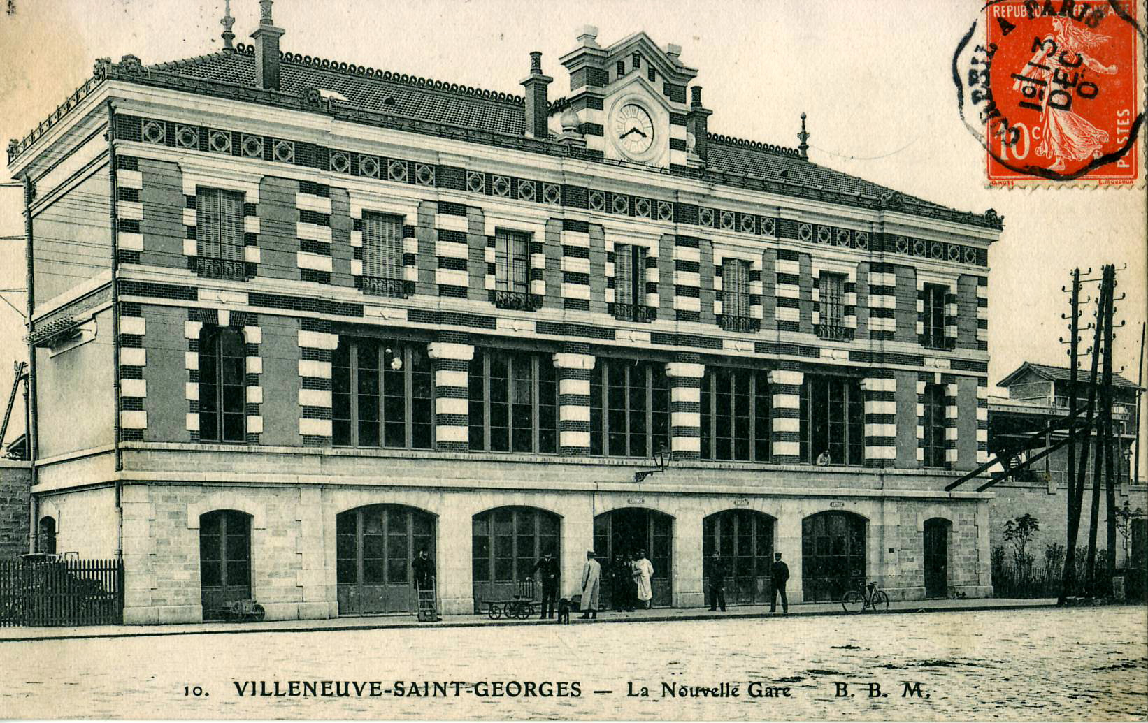 Carte postale ancienne éditée par B. B. M., n°10 : VILLENEUVE-SAINT-GEORGES - La nouvelle Gare